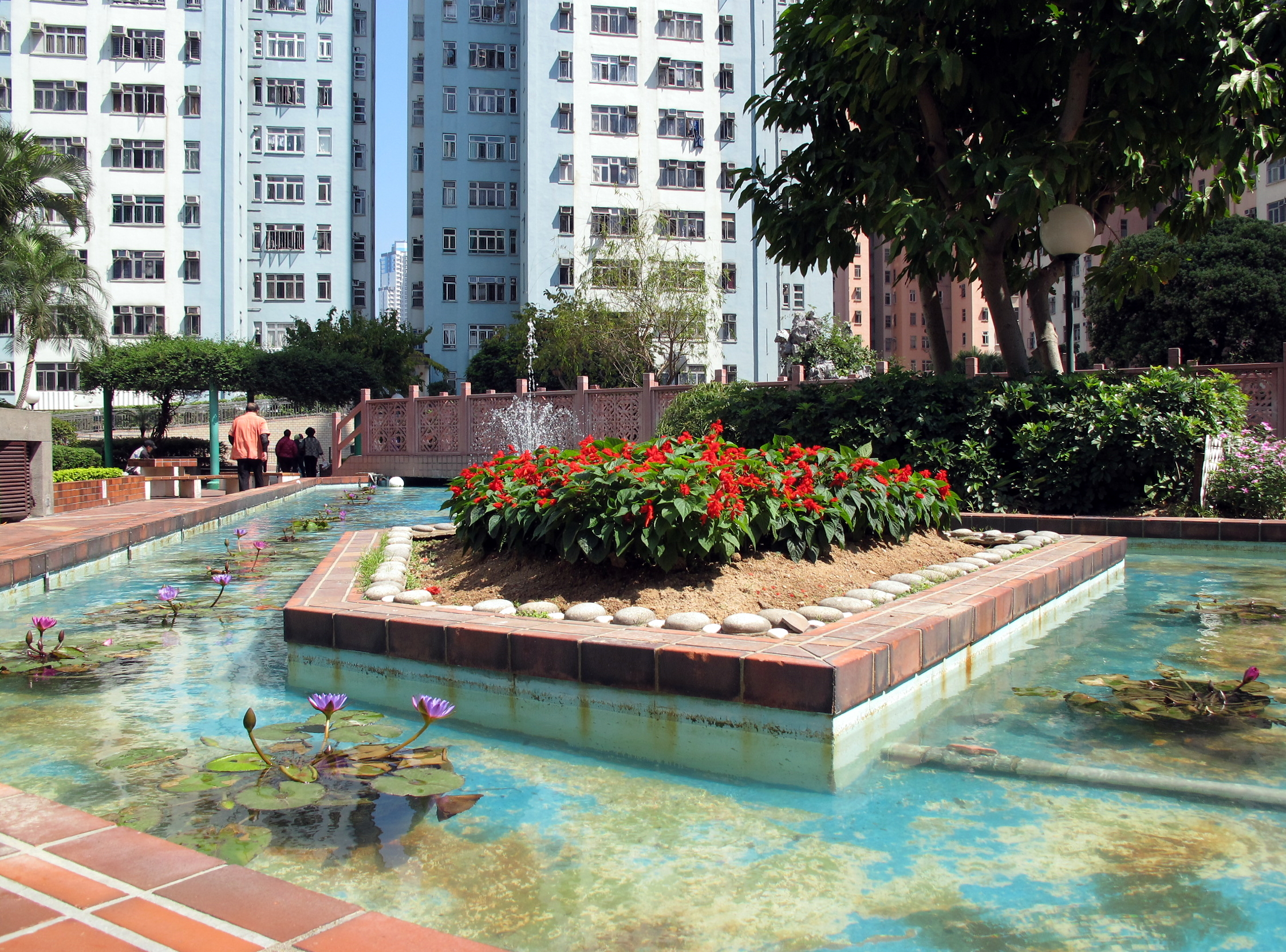 Telford Garden Ponds